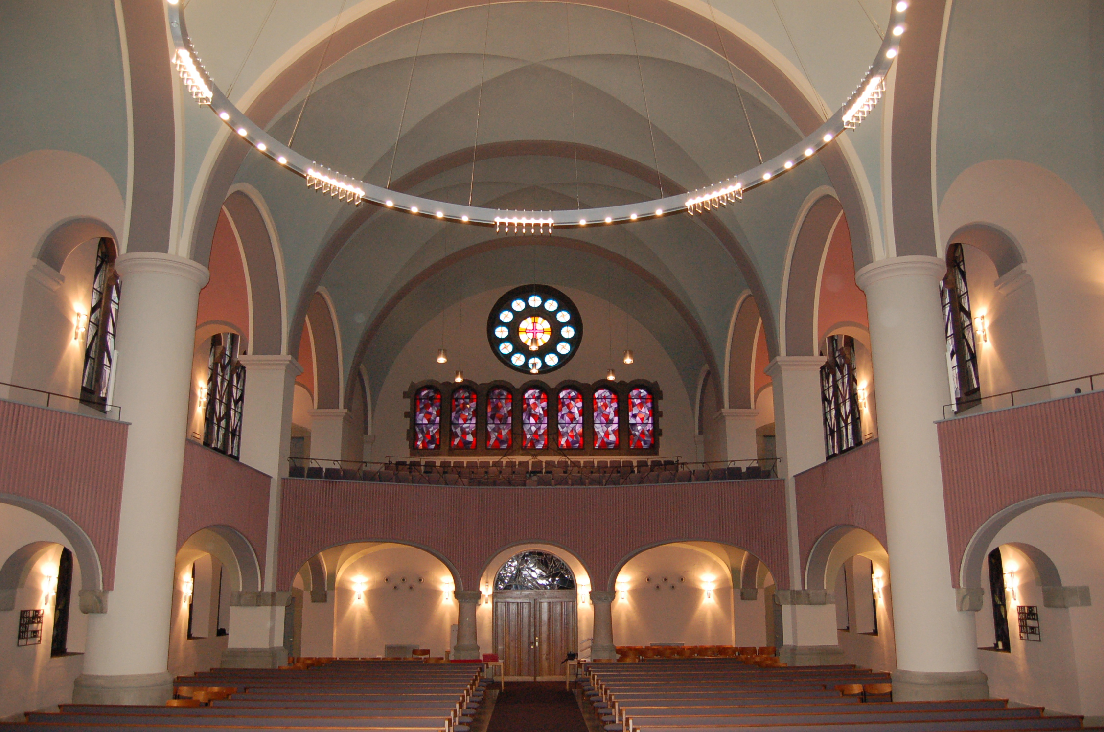 Eingangsportal der Erlöserkirche Essen